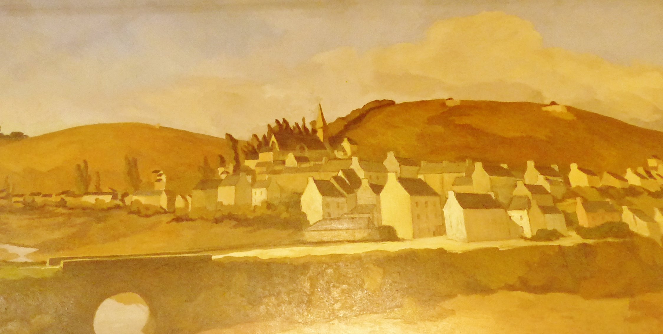 Maurice Le Scouëzec : le village de Pouldavid (Douarnenez, halles)